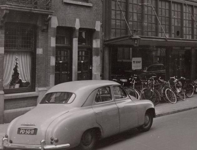 Skoda 1200